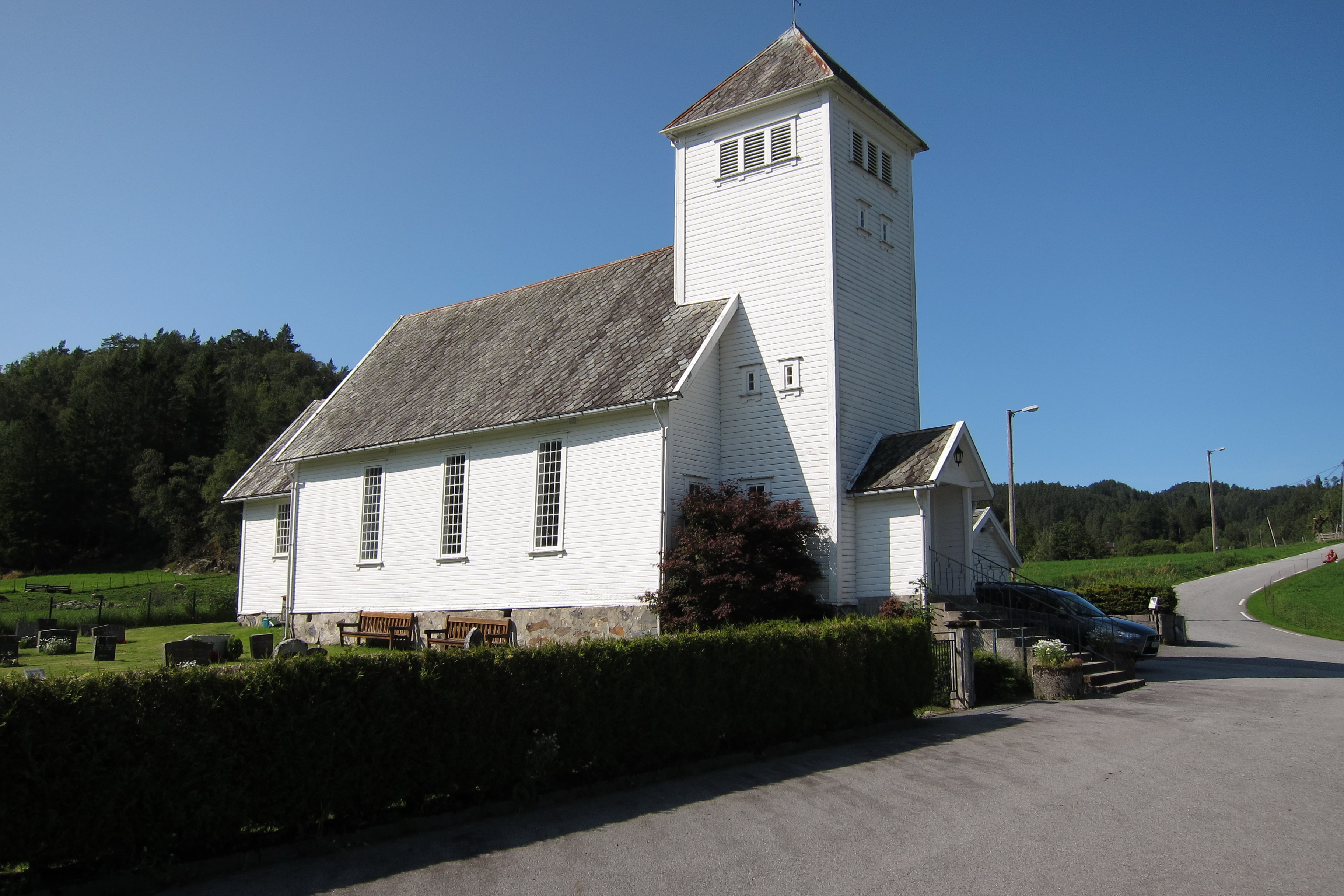 Suldal, Norway